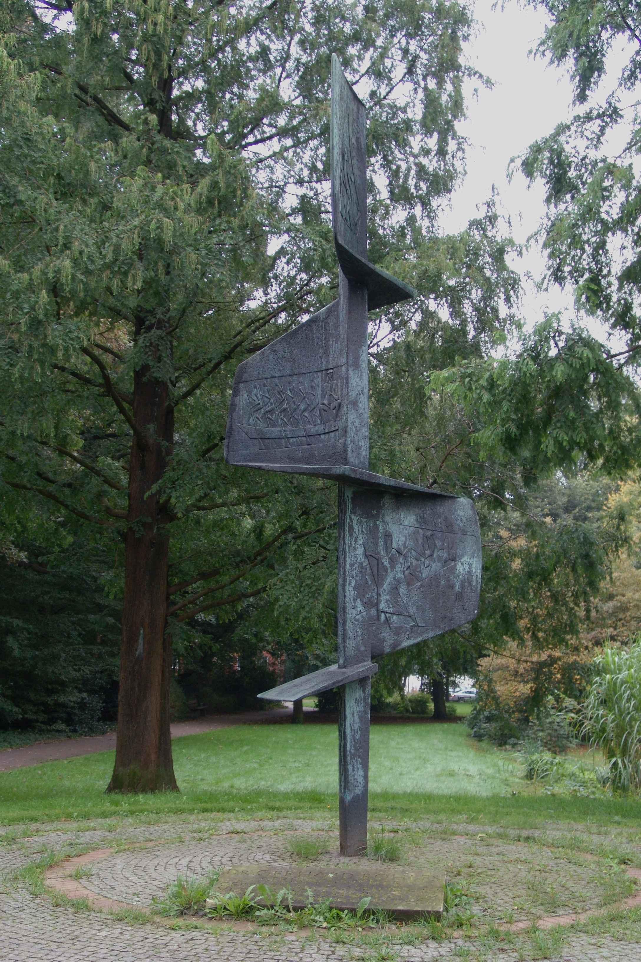 Denkmal für den Vegesacker Afrikaforscher Gerhard Rohlfs. Bronzeplastik.